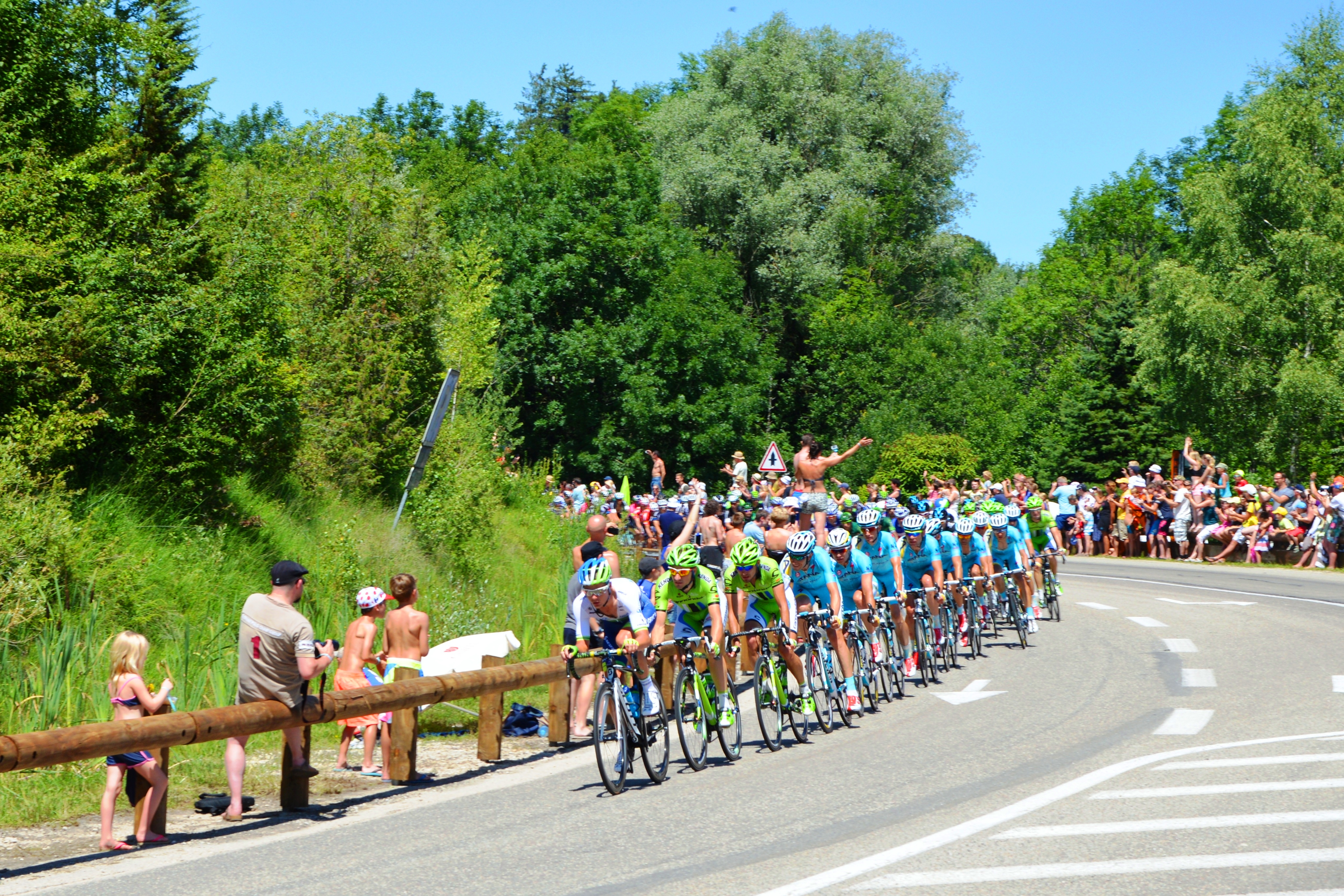 Etape 11 du Tour de France 2014. Les premiers du peloton. Photo prise sur la D27 près du Lac de Chalain, Jura.